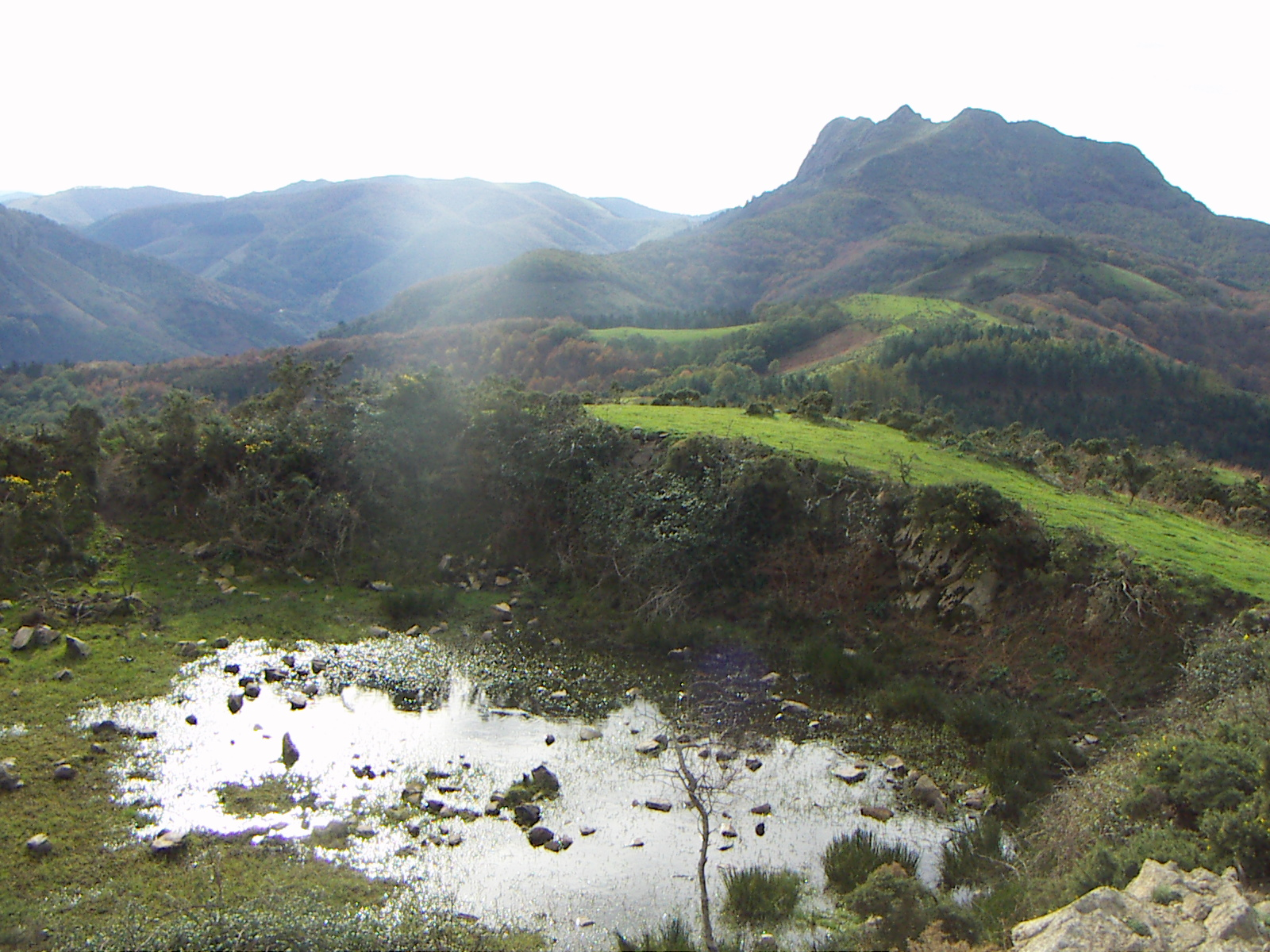 Unfinished military fortress of Erlaitz (Gipuzkoa, Spain)